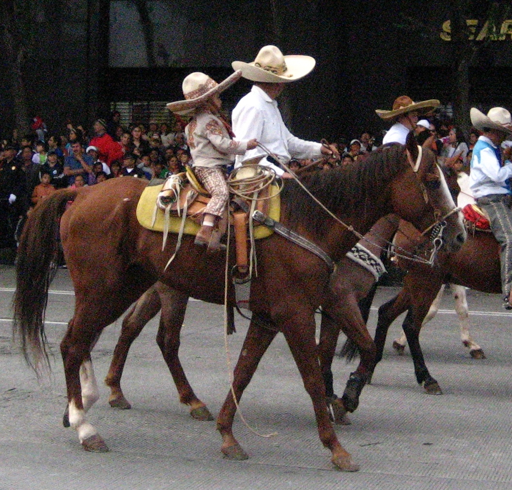 charros mexiko 16 septiembre 2009